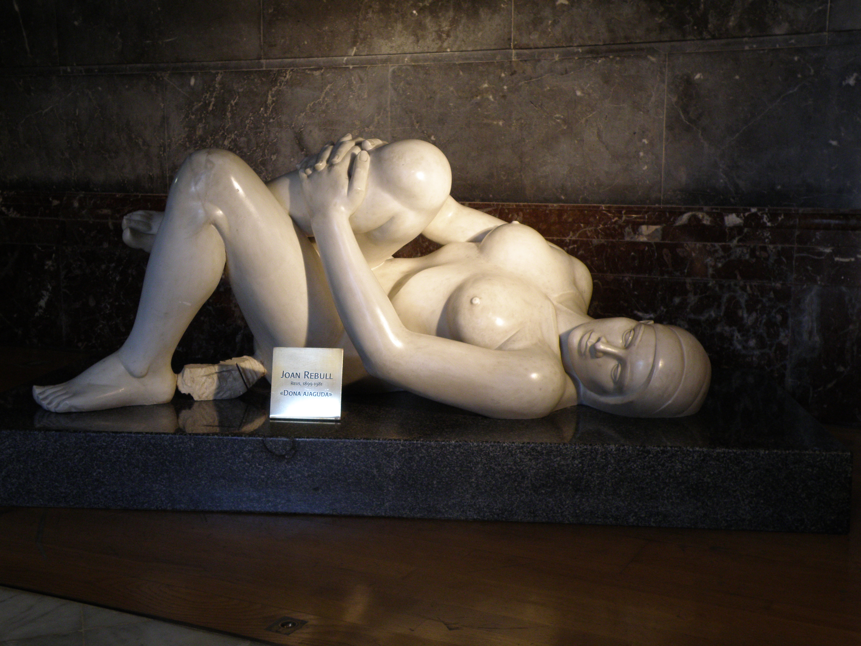 Escultura titulada "Dona Ajaguda" de Joan Rebull a l'Ajuntament de Reus, Baix Camp.